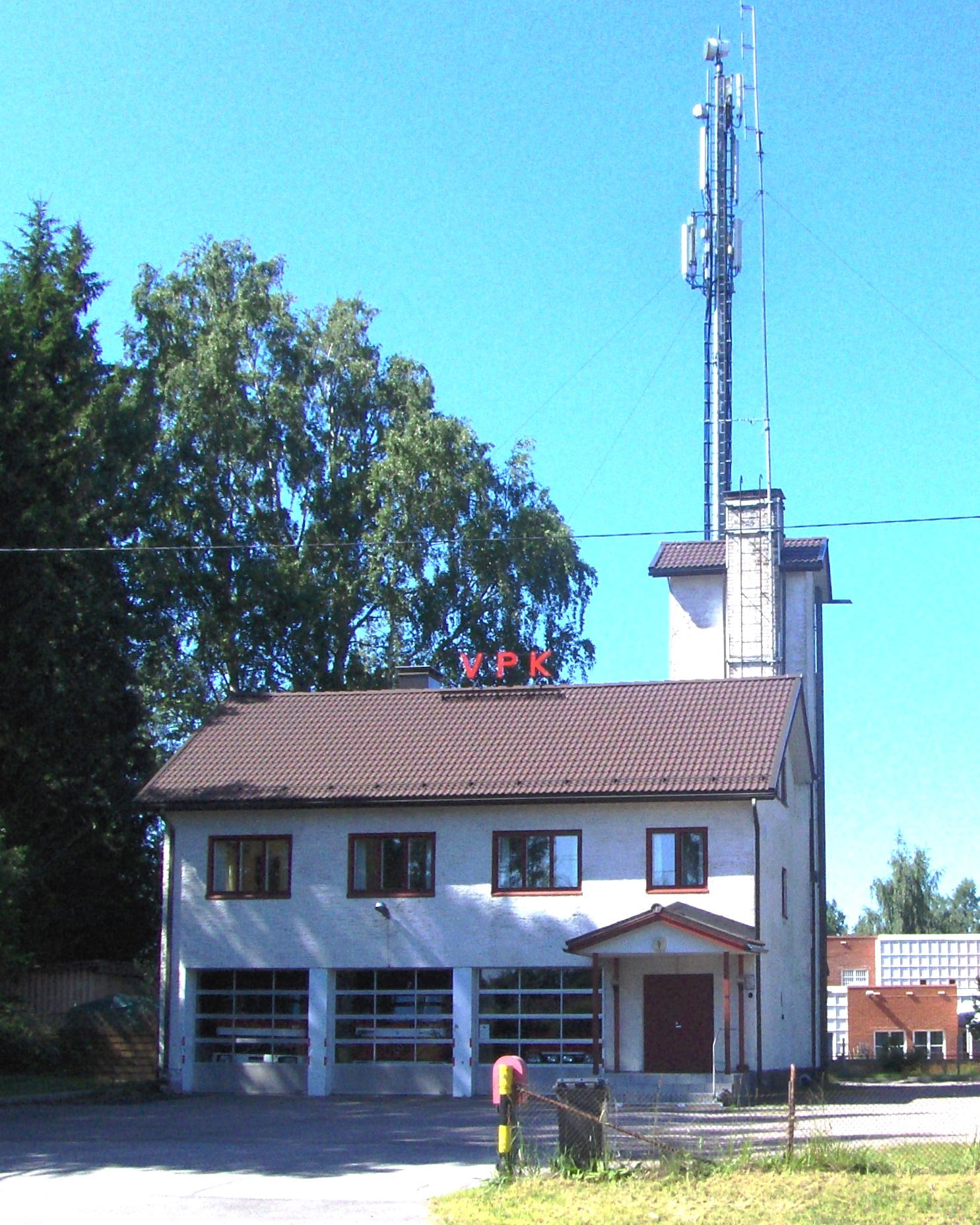 Puistolan vapaapalokunta Puistolanraitilla Puistolassa Helsingissä